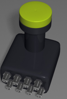 Konwerter octo z wyjściami na 8 odbiorników satelitarnych. W jednej obudowie umieszczono układ elektroniczny umożliwiający przesył sygnału dla ośmiu odbiorników.W uproszczeniu jest to osiem konwerterów Full Band w jednej obudowie działających niezależnie od siebie.